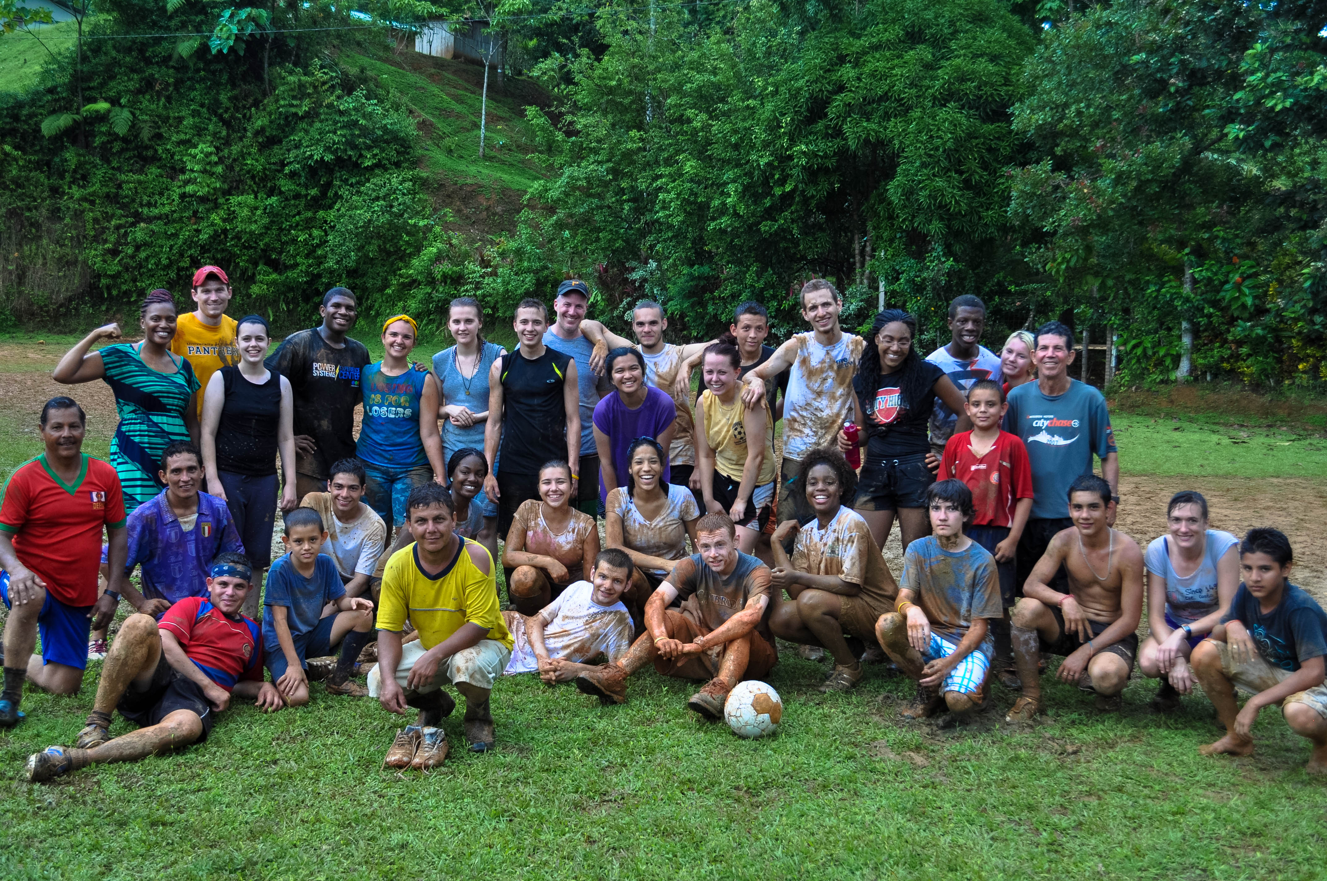 Un grupo de jóvenes costarricenses luego de jugar al fútbol.